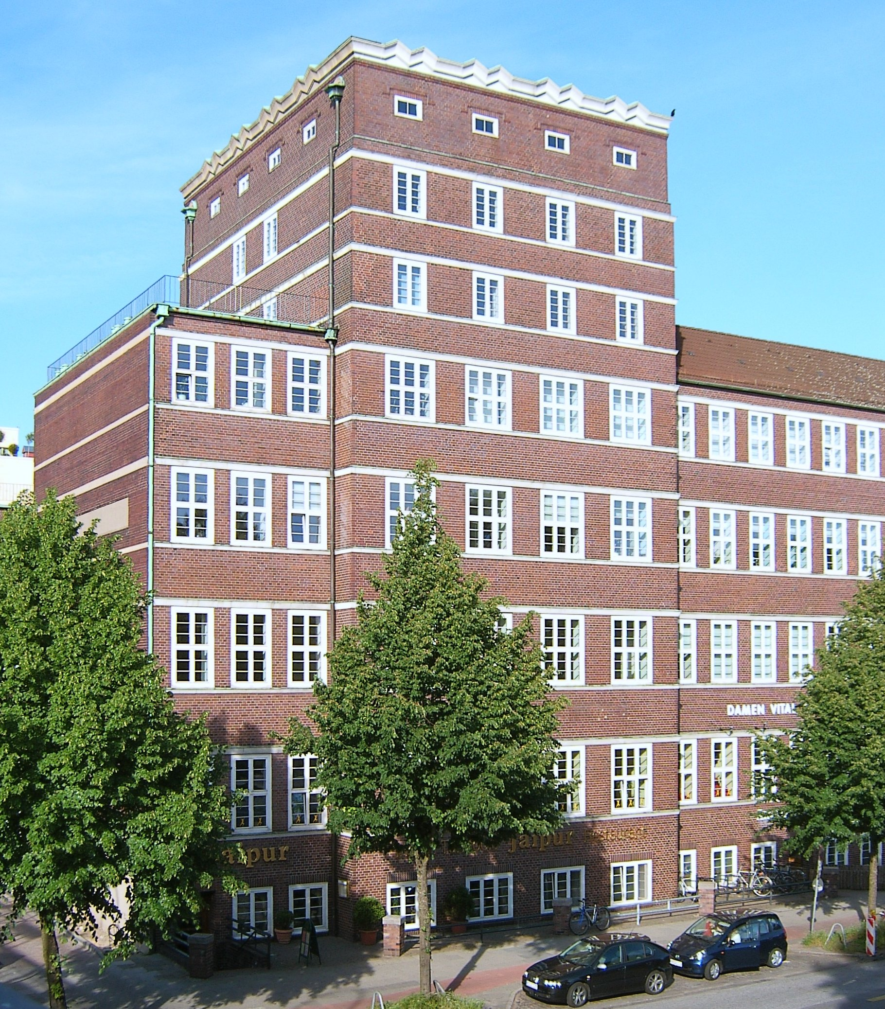 Ehemaliges Hammoniabad im Lerchenfeld in Uhlenhorst